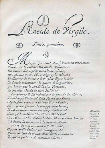 Une page extraite de l'Enéide de 1648.